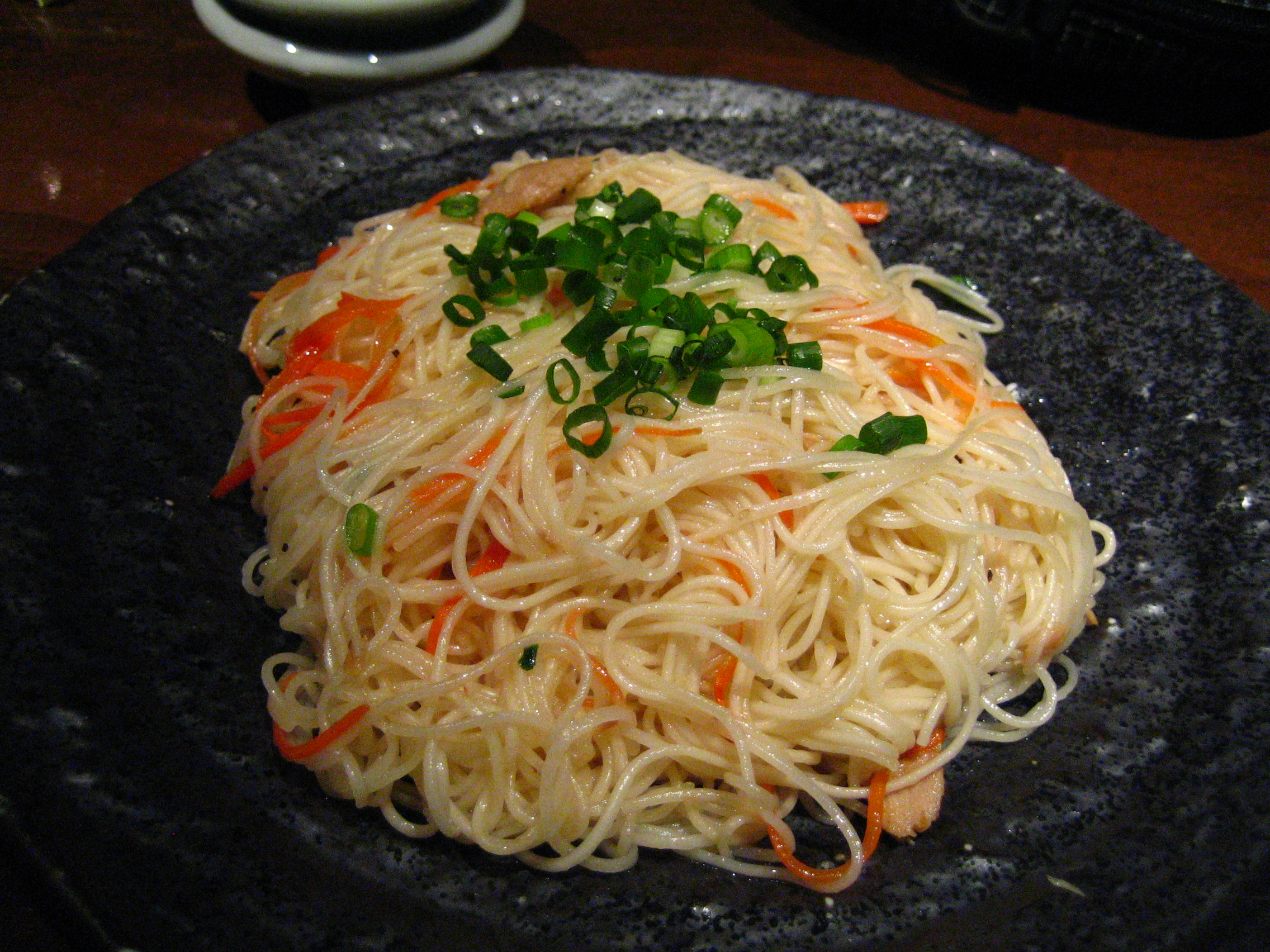 at Naby to Kamado, an okinawan cuisine restaurant in Naha, Okinawa